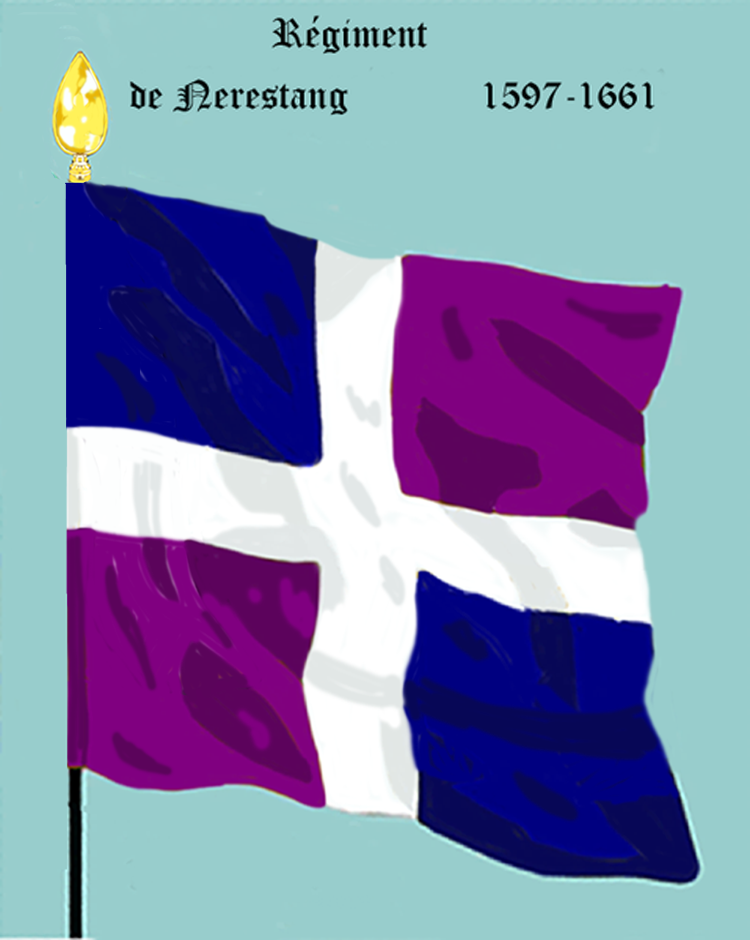 Ordonnanzfahne eines königlich französischen Infanterie-Regiments. - Entnommen und überarbeitet aus: „LES UNIFORMES ET LES DRAPEAUX DE L'ARMÉE DU ROI“ Marseille 1899. (Drapeau d'ordonnance d' un régiment française d'infanterie royale.)